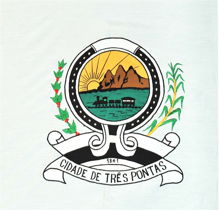 Bandeira do município de Três Pontas, Minas Gerais, Brasil.